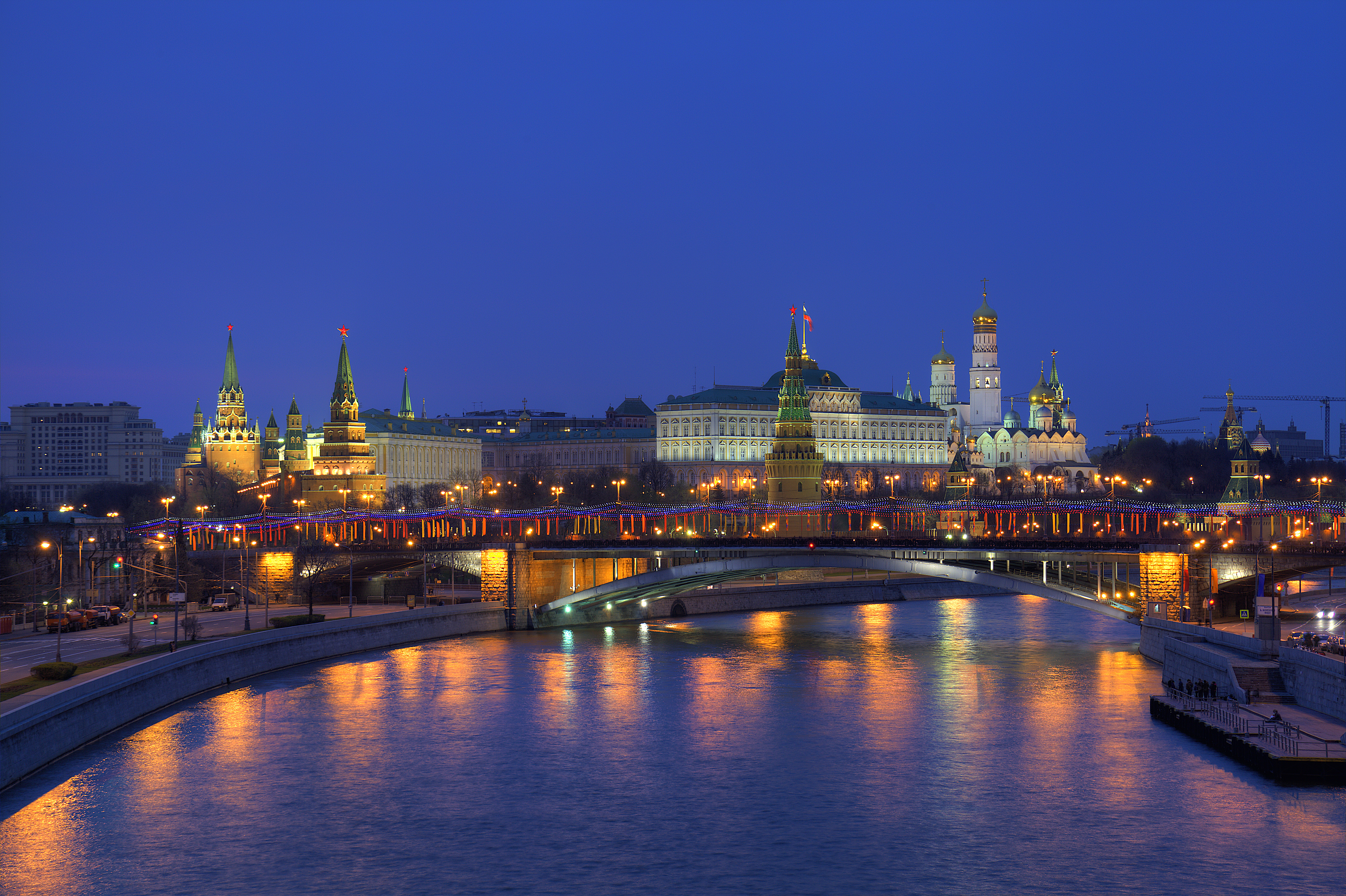 Московский кремль, река Москва